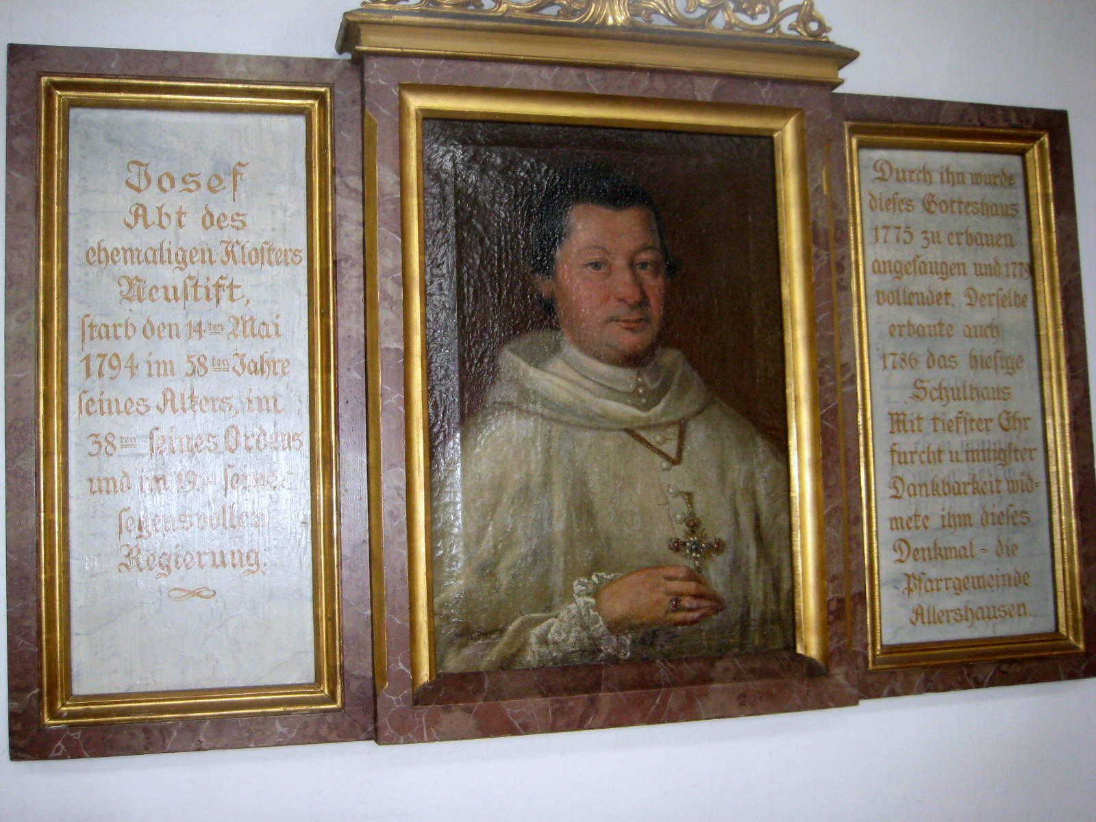 Gedenktafel an den Erbauer der Pfarrkirche St.Josef in Allershausen, Landkreis Freising, Bayern: Joseph Gaspar, Abt des Klosters Neustift in Freising 1781–1794